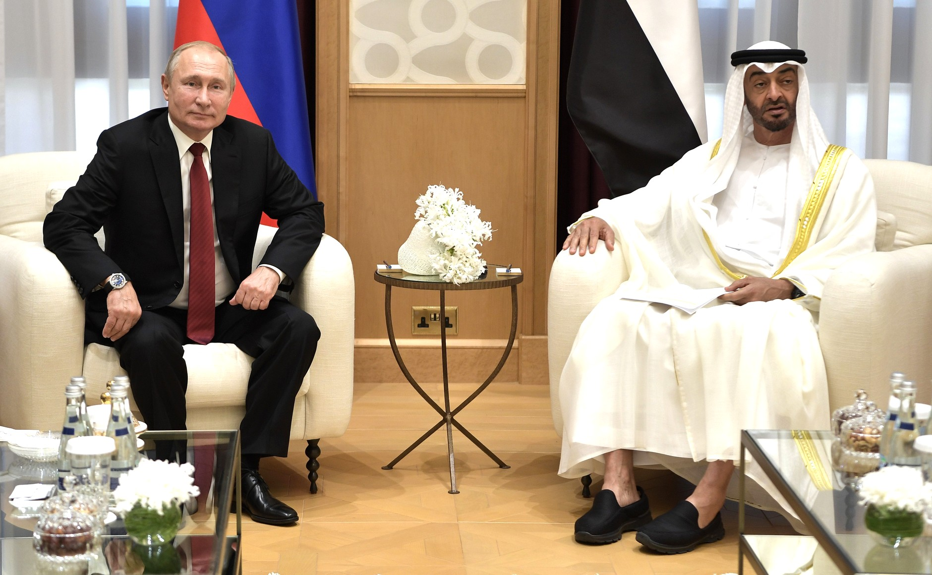 Президент России Владимир Путин и наследный принц Абу‑Даби Мухаммед бен Заид Аль Нахайян.